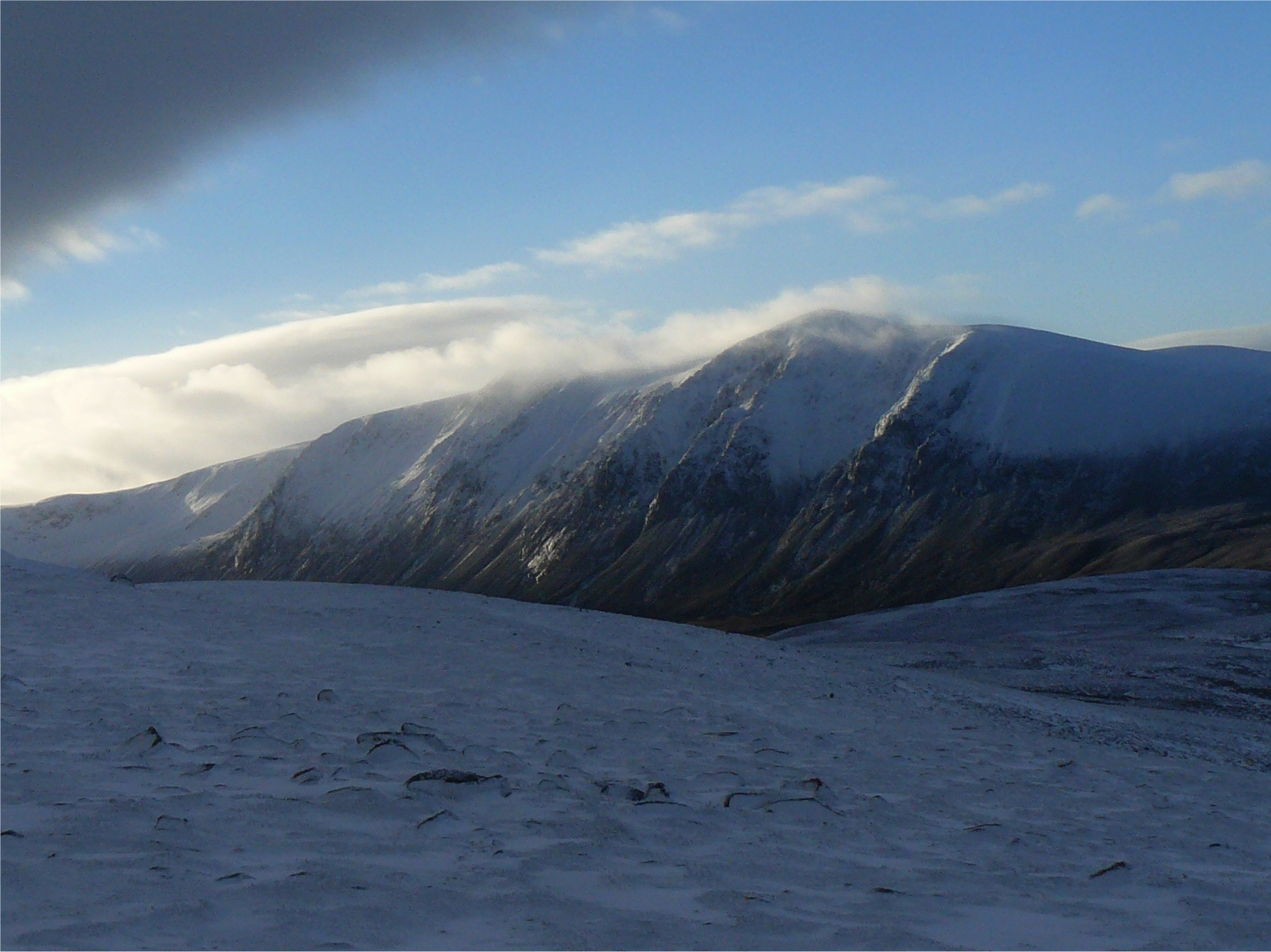 Sgor Gaoith